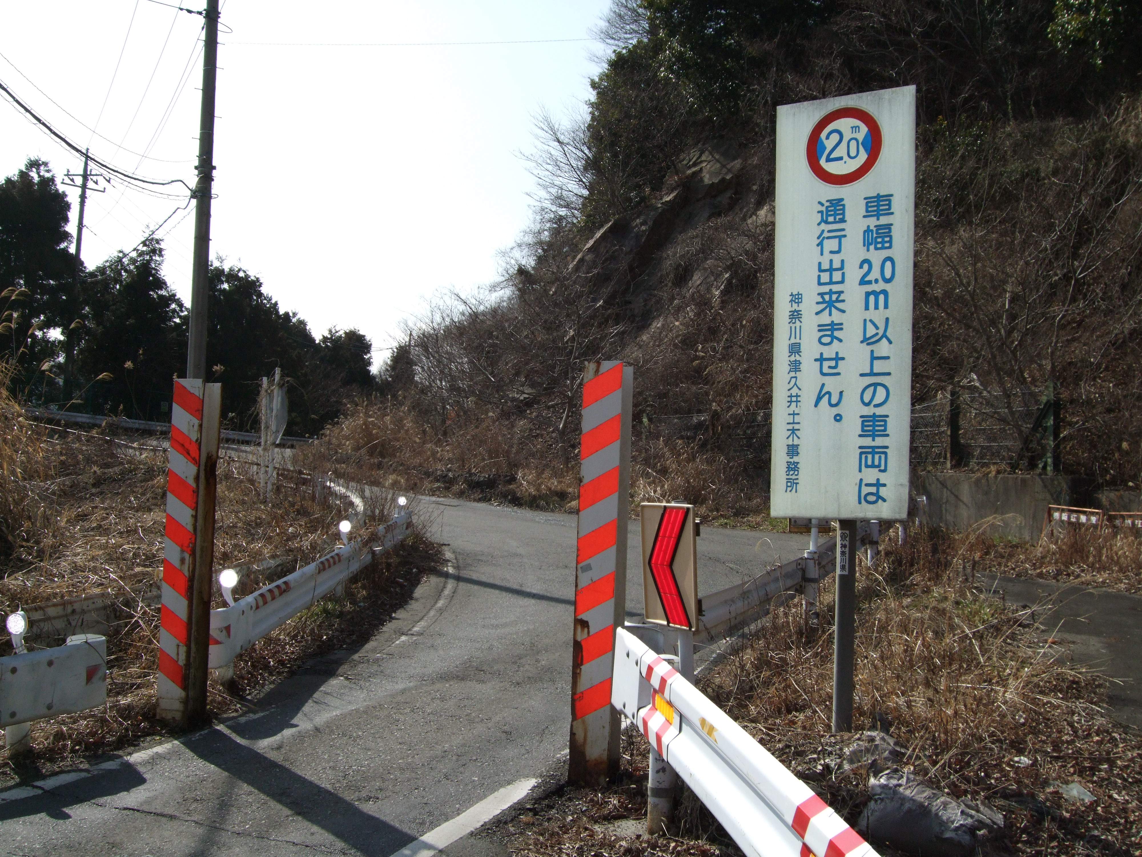 Makiba-pass2